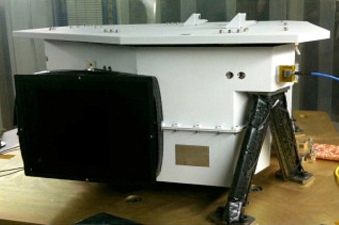 Spectromètre infrarouge JIRAM de la sonde spatiale JUNO de la NASA